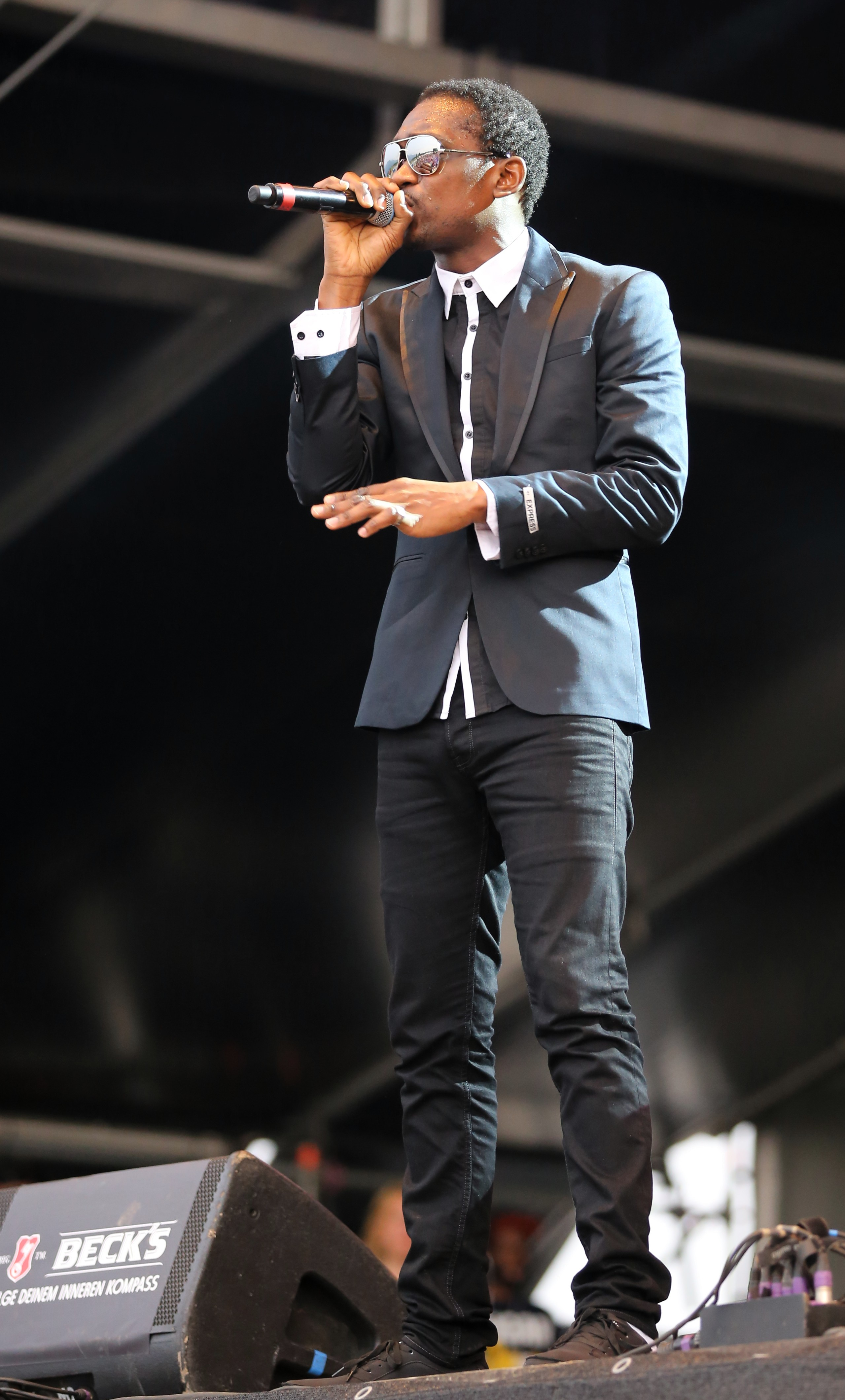 Busy Signal auf dem Chiemsee Reggae Summer Festival 2013 Festivalsommer This photo was created with the support of donations to Wikimedia Österreich and Wikimedia Deutschland in the context of the CPB project "Festival Summer".